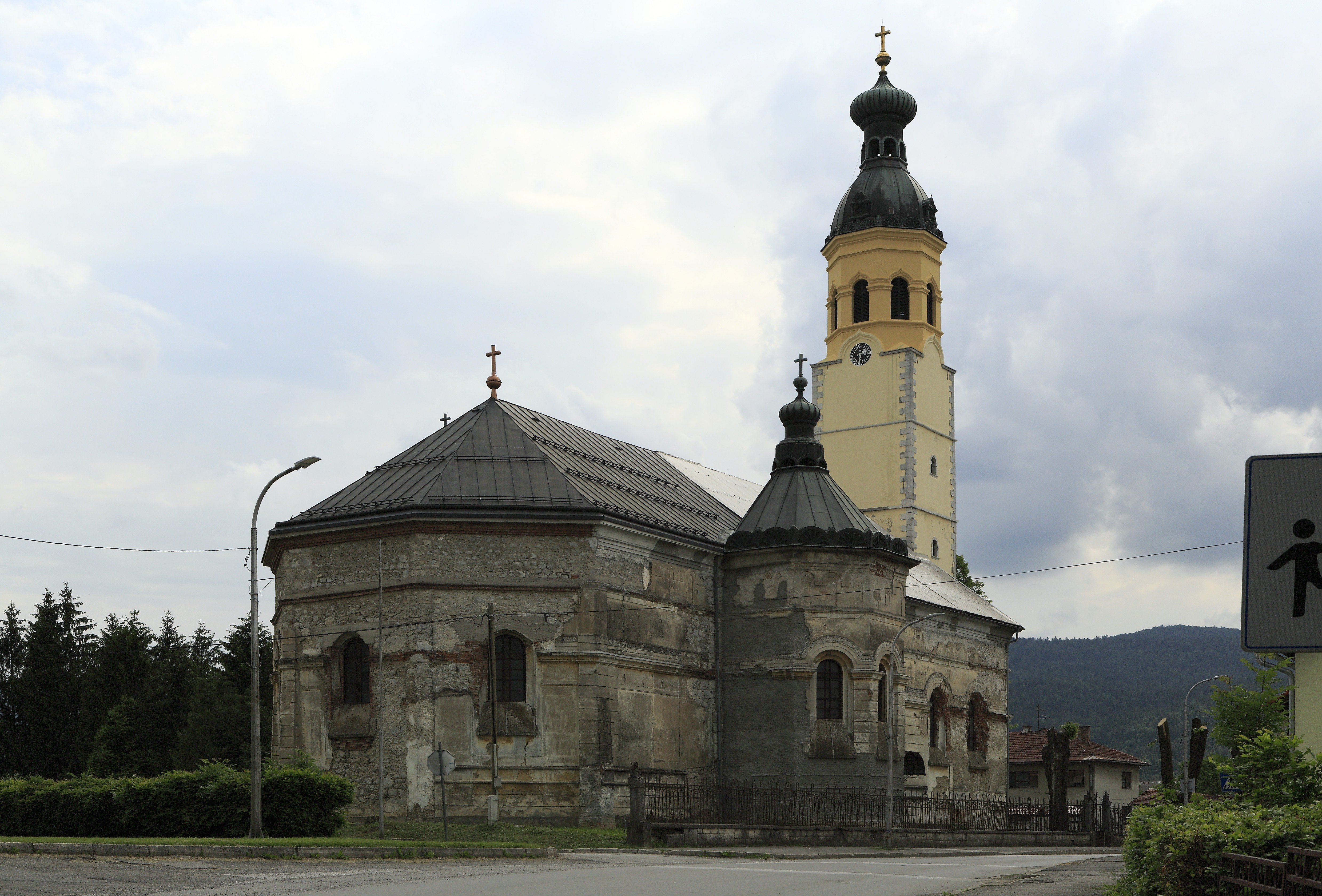 Die Kirche ist schon seit zwanzig Jahren in diesem lädierten Zustand. Man muss annehmen, dass die Schäden im Krieg um die Republik Krajina entstanden sind. Immerhin ist der Turm saniert worden.